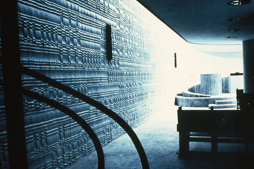 Bassorilievo continuo di Nino Caruso